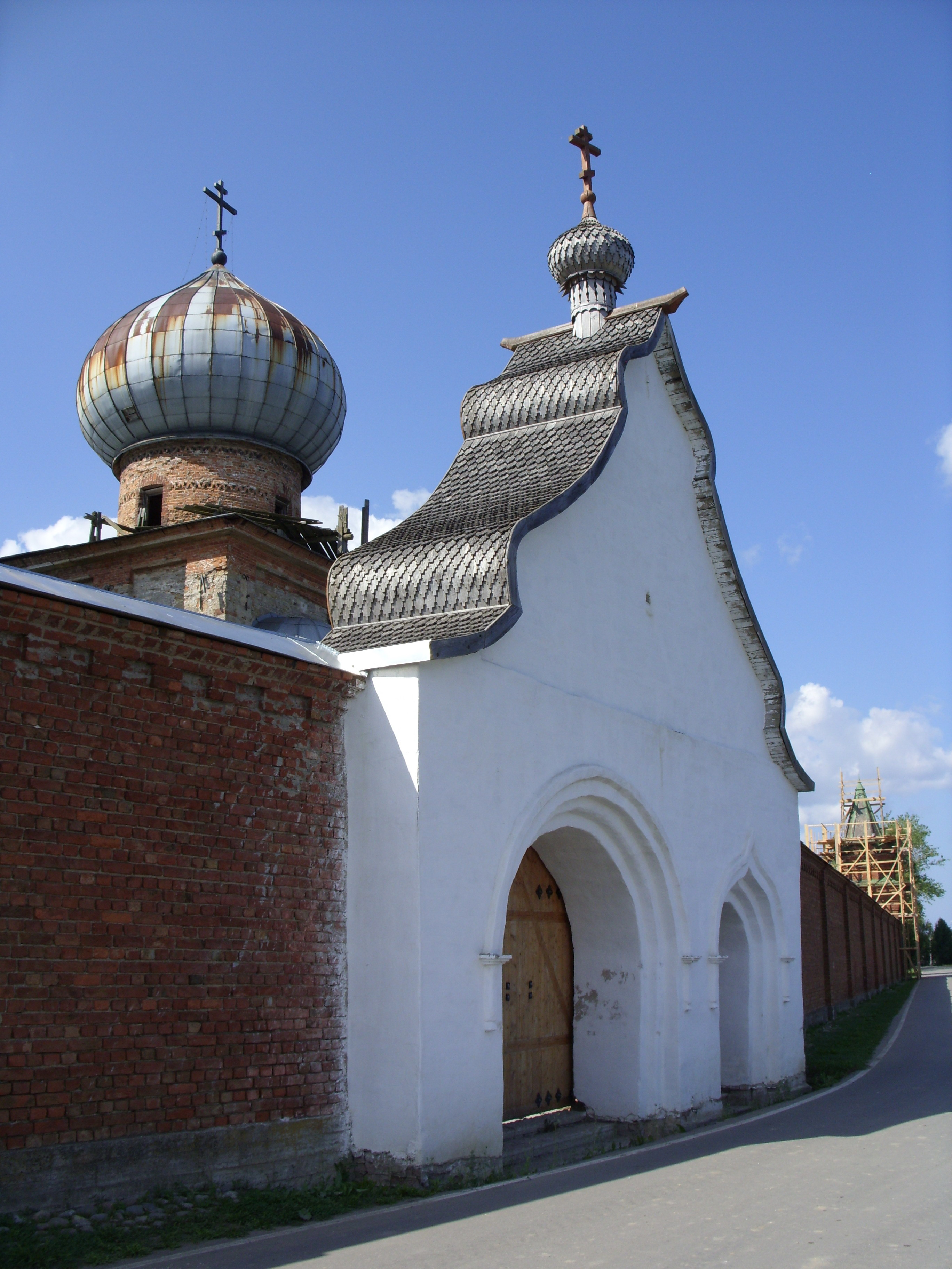 Ворота Никольского монастыря в Старой Ладоге